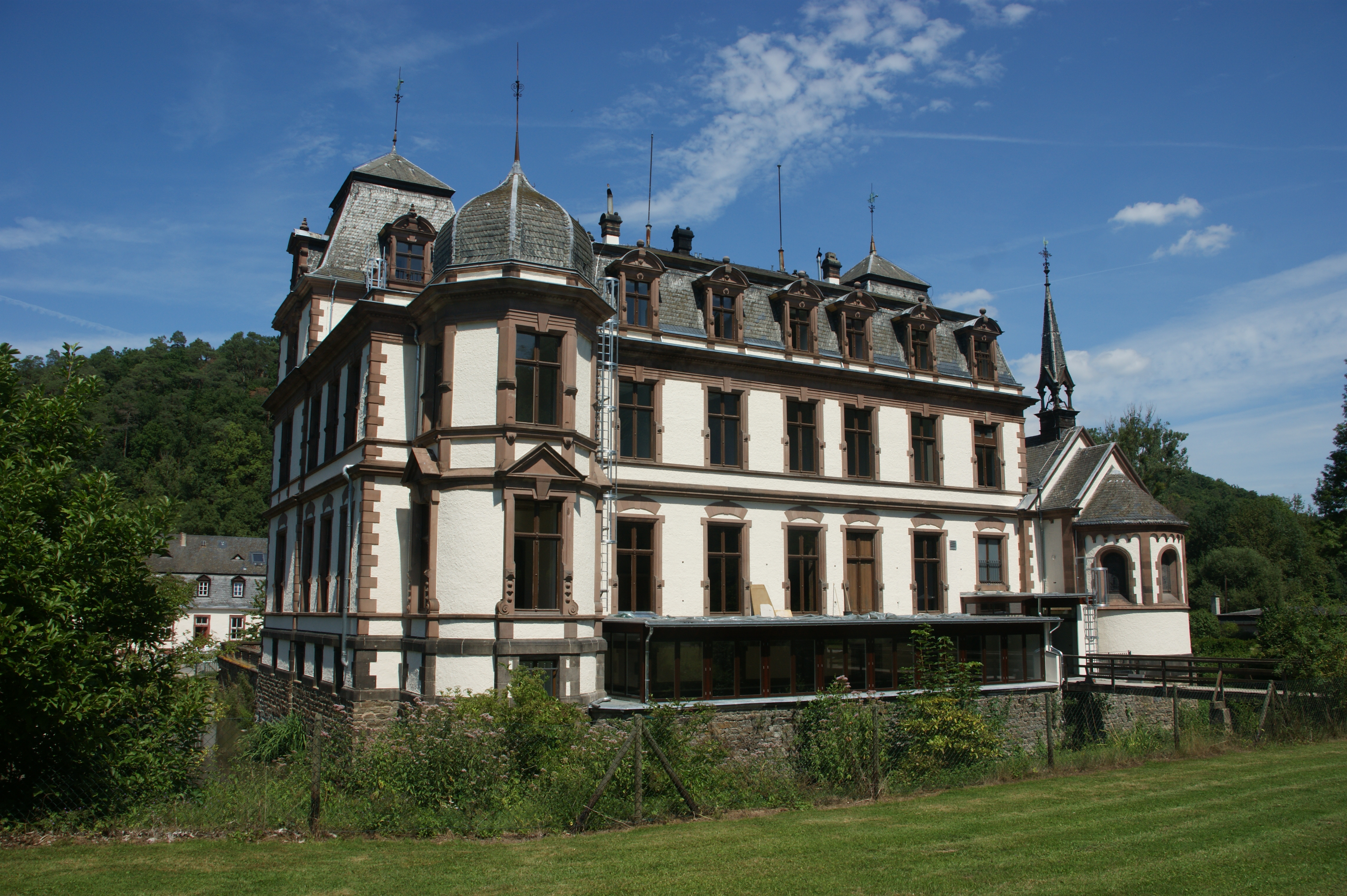 Schloss Ahrenthal in Sinzig